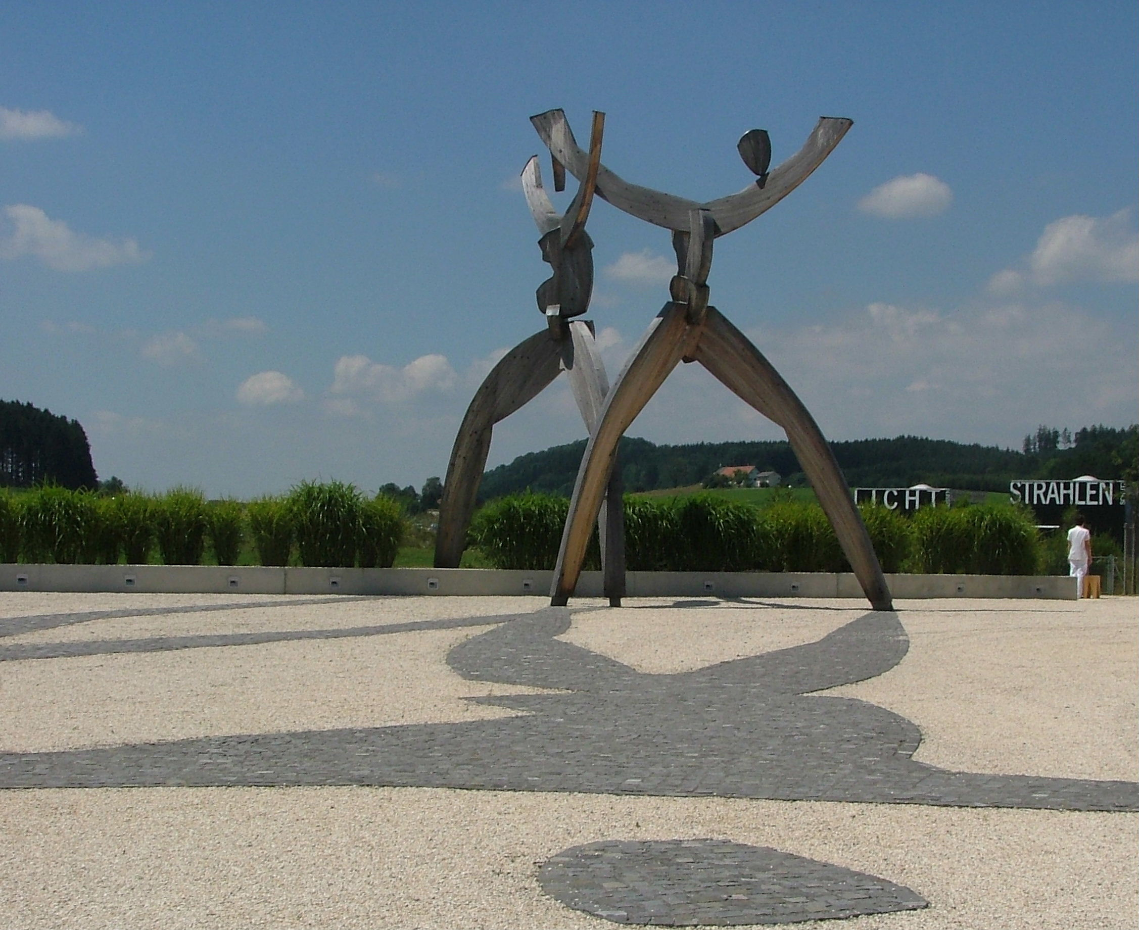 Erkheim